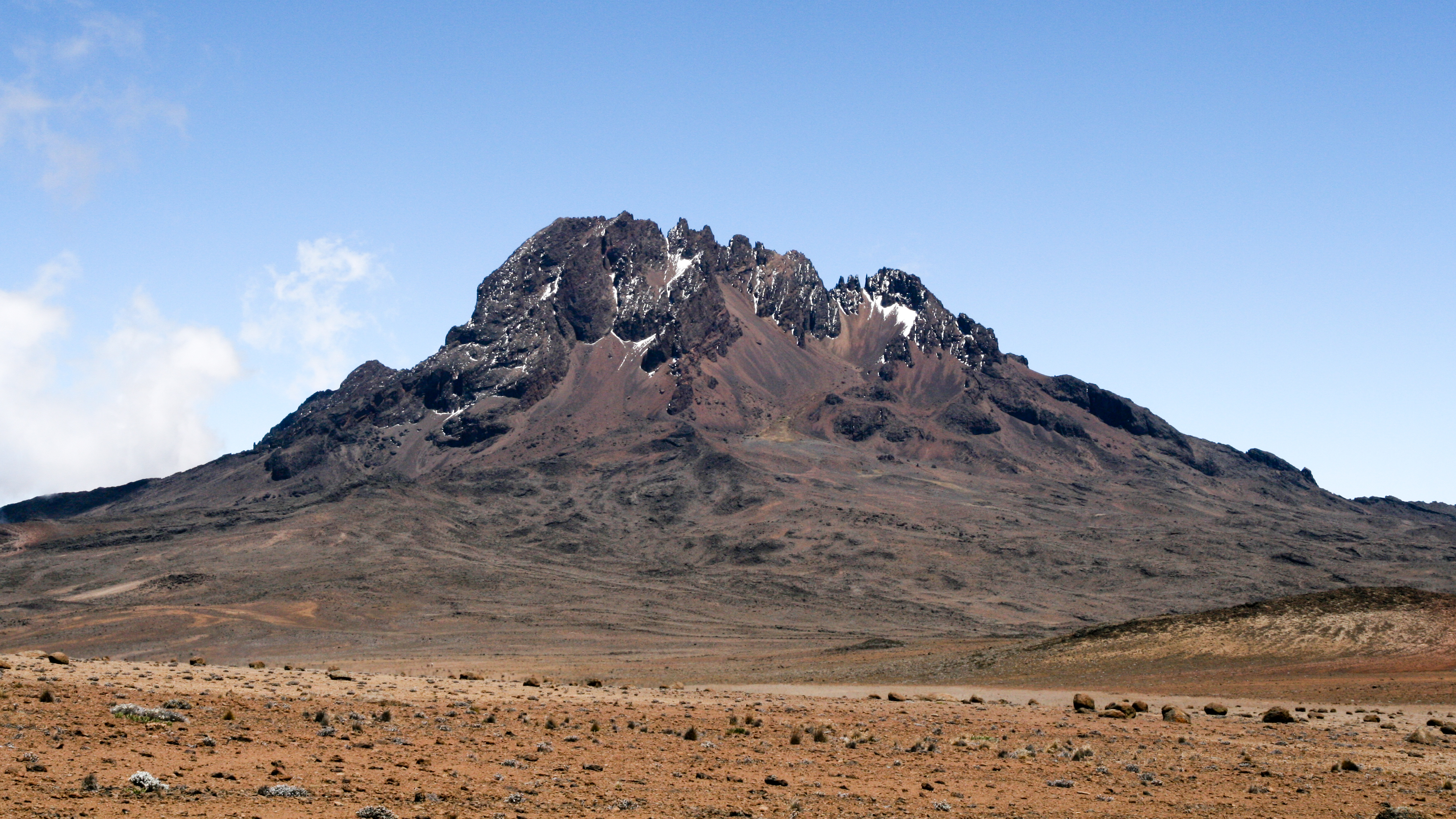 Mawenzi